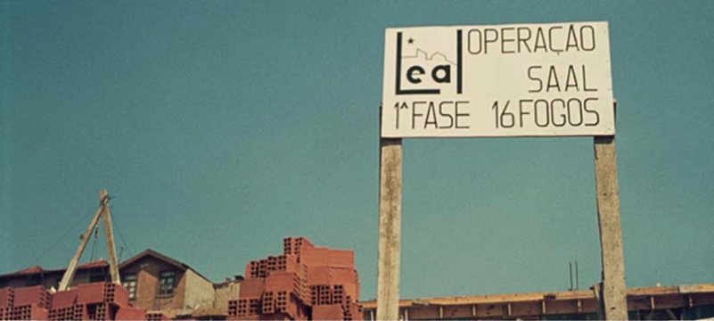 Construção do Bairro do Leal Coleção Alves Costa, Centro de Documentação 25 de Abril